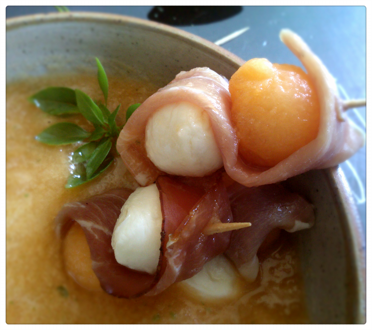 Réalisation de la Soupe de melon aux brochettes mozzarella